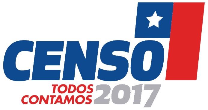 Logotipo del censo chileno de 2017